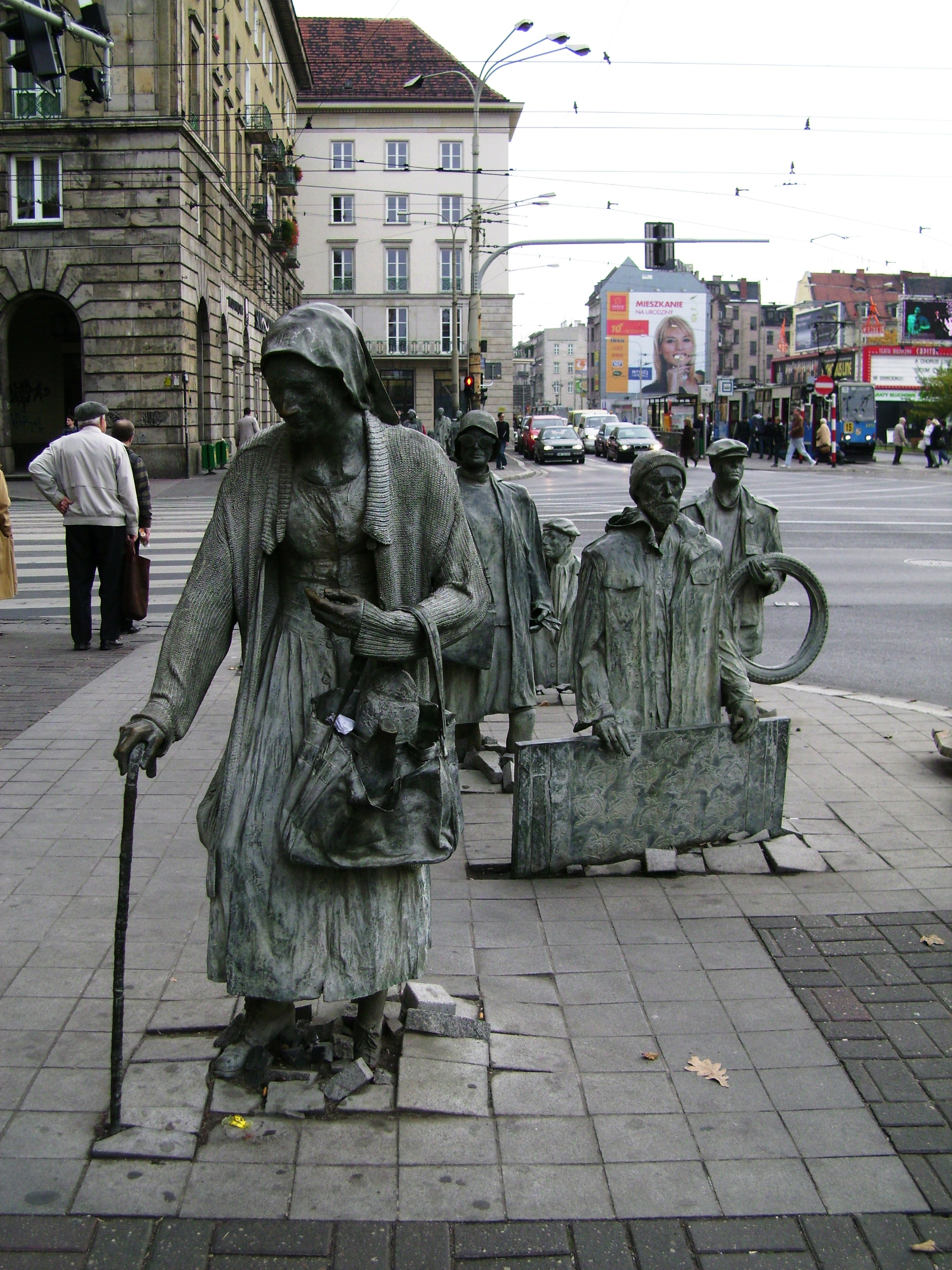 wrocławski pomnik stojący z dwóch stron skrzyżowania ulic Świdnickiej i Piłsudskiego. Składa się z czternastu odlanych z brązu postaci.